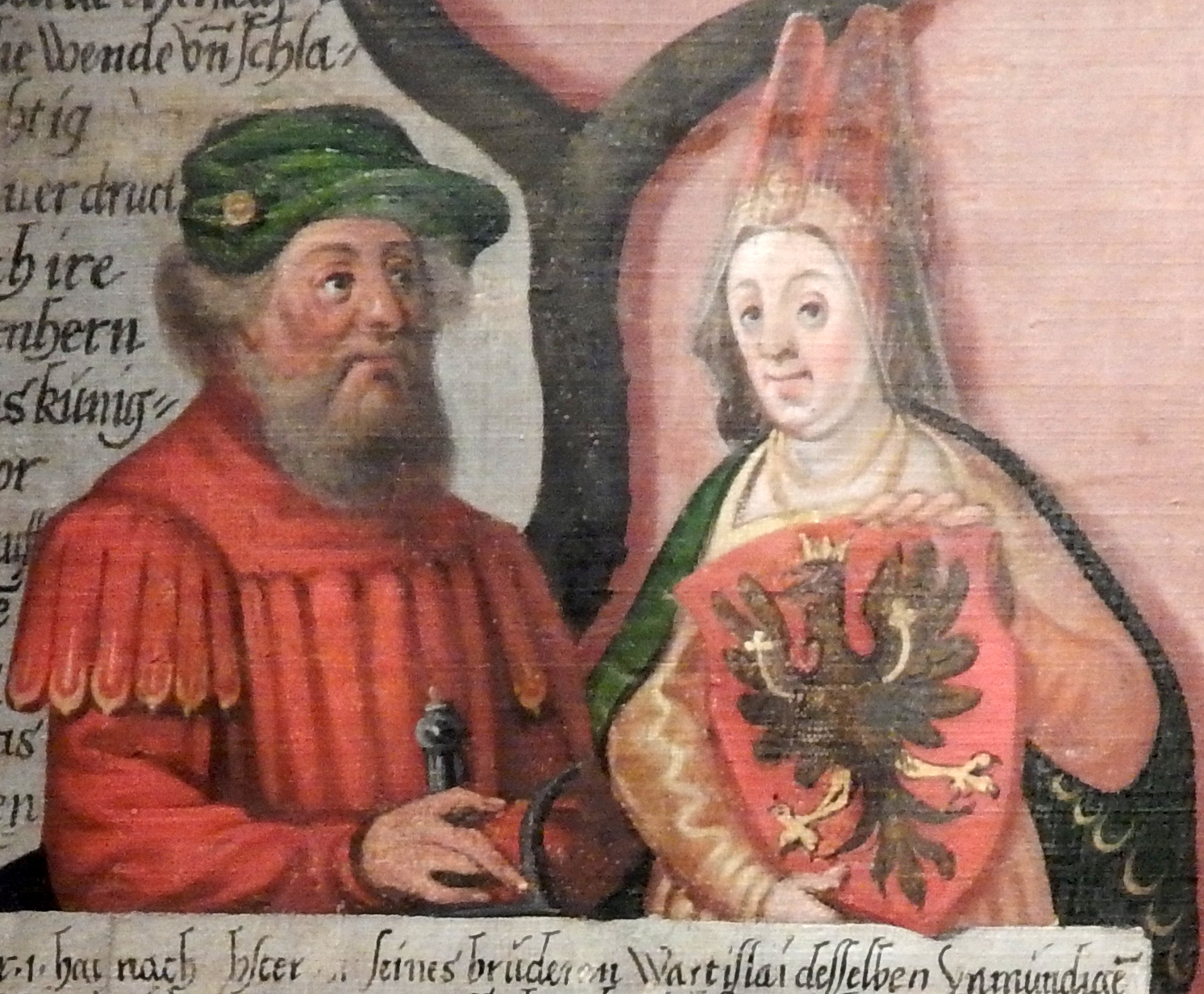 Ratibor I. von Pommern und seine Gemahlin Pribislawa von Polen.